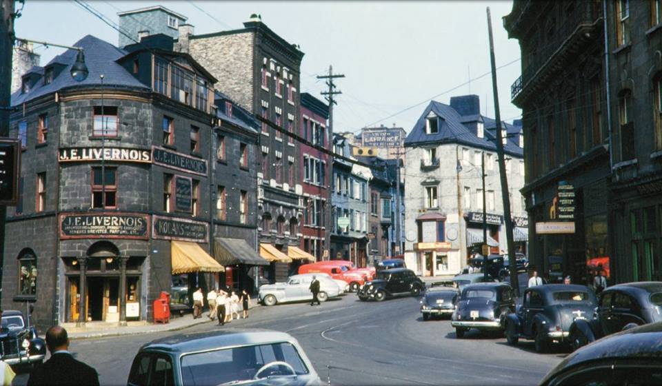 Carrefour des rues Saint-Jean, Couillard et côte de la Fabrique, Québec, 1947